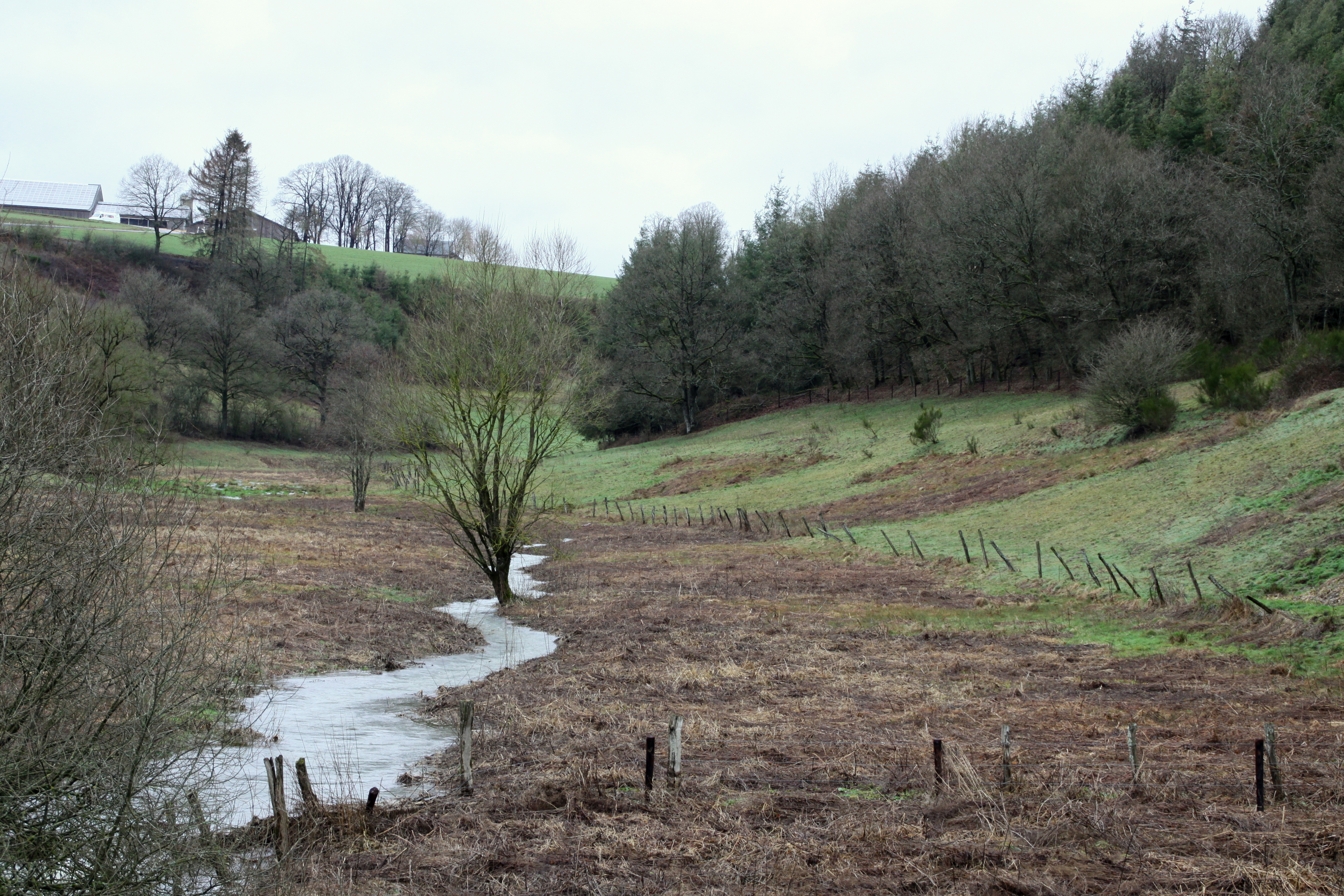 D'Irbich virum Zesummelaf mat der Fëschbech